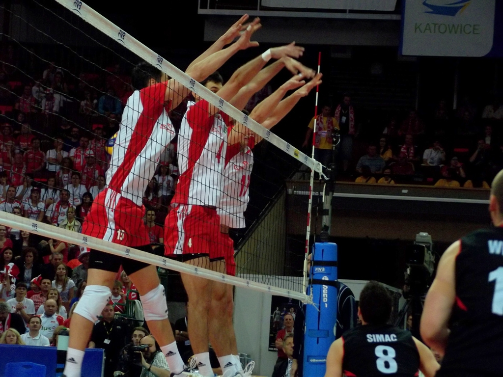 Zdjęcie zrobione podczas zawodów Ligi Światowej 2012 w katowickim Spodku.